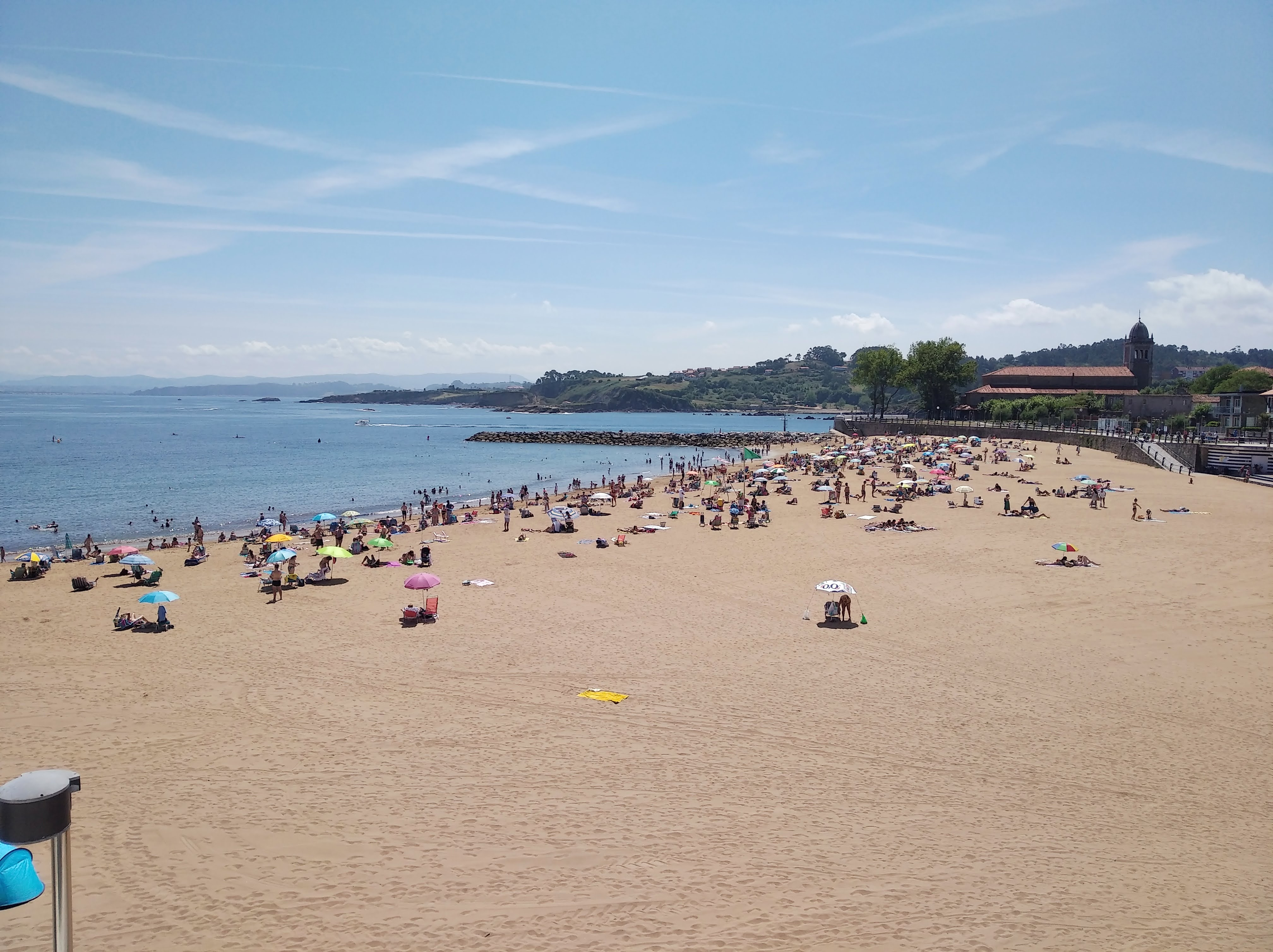 Playa de Santa María en Luanco, norte de España